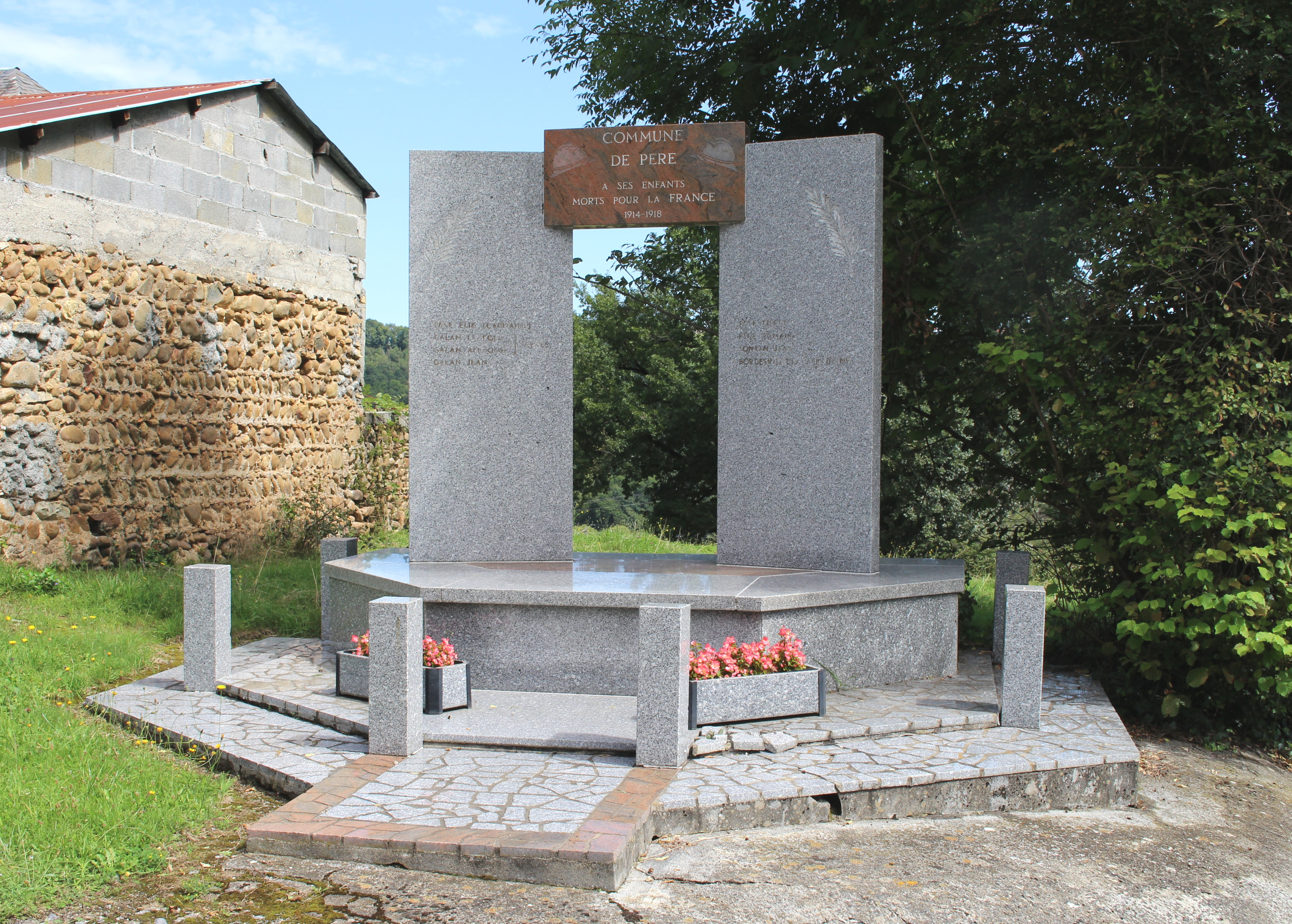 Monument aux morts de Péré (Hautes-Pyrénées)